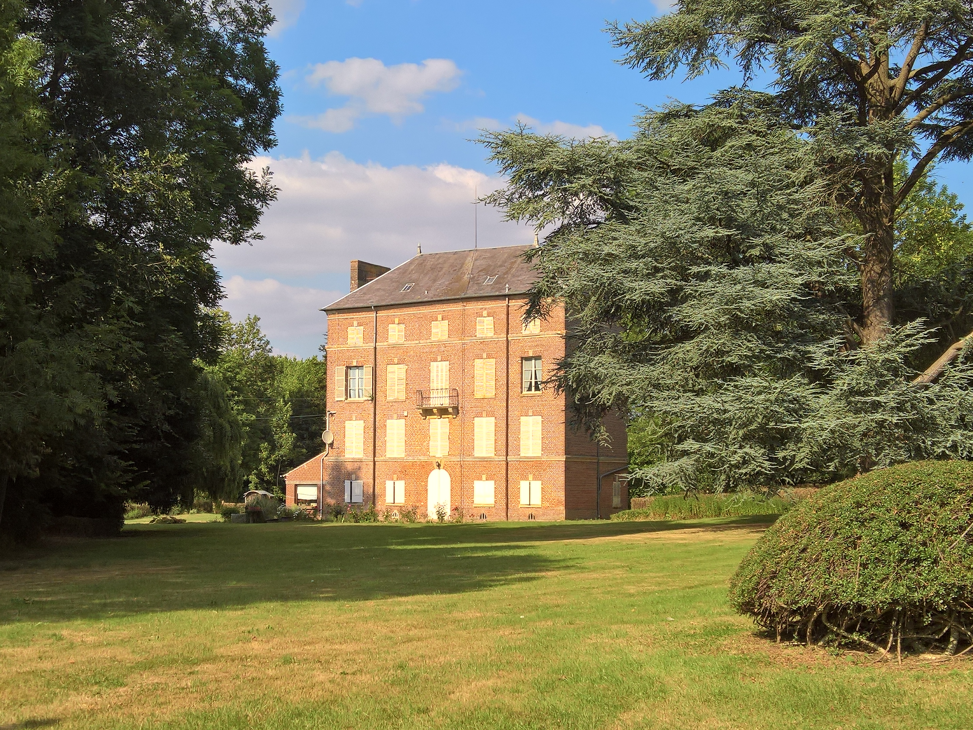 Le Hamel (Oise), hameau de Rieux : Le Château